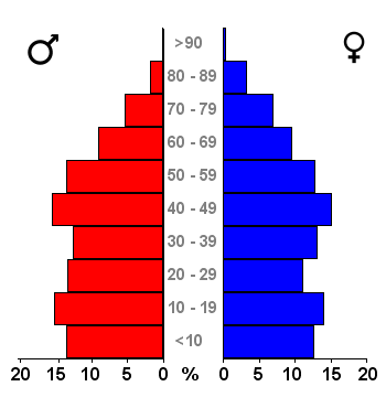 Age pyramids for the 443 municipalities in the Netherlands. Data 2007. Statistics provided by Centraal Bureau voor de Statistiek, Voorburg/Heerlen. Source: Tabel: Bevolking Nederland per gemeente en diverse regio's naar leeftijd, geslacht en burgerlijke staat, 1 januari 1988-2007. Gewijzigd op 24 mei 2007 (on-line database StatLine) Bevolkingspiramide - Gemeente Oldebroek (2007).png